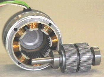 Struttura interna di un motore passo-passo.